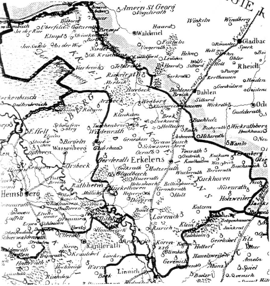 Map: Landkreis Erkelenz 1820